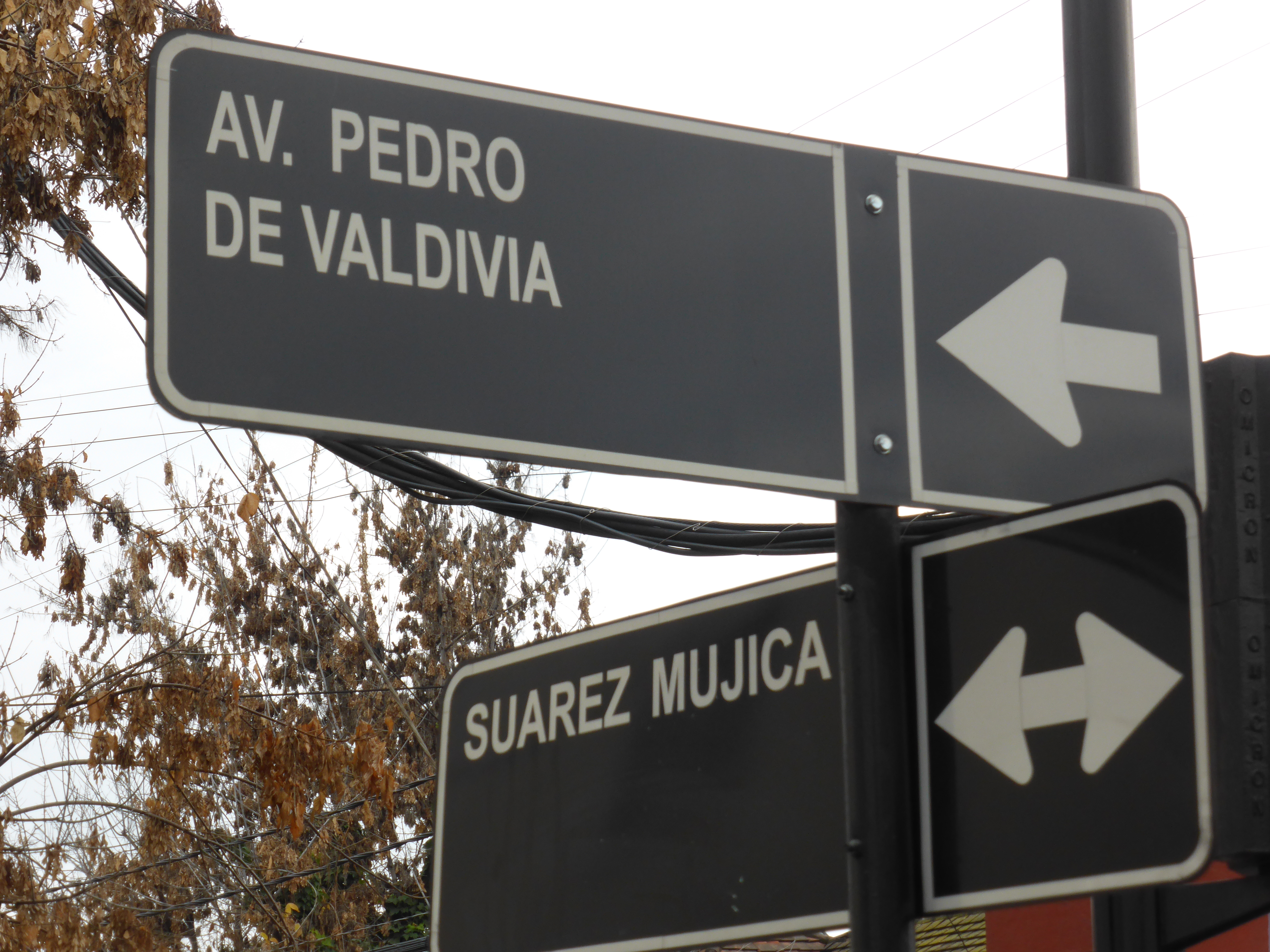 Estos rótulos o carteles se encuentran en la esquina de la calle Suárez Mujica con avenida Pedro de Valdivia, de la comuna de Ñuñoa, de la ciudad de Santiago de Chile.